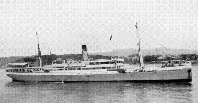 Der Reichspostdampfer PRÄSIDENT der DOAL